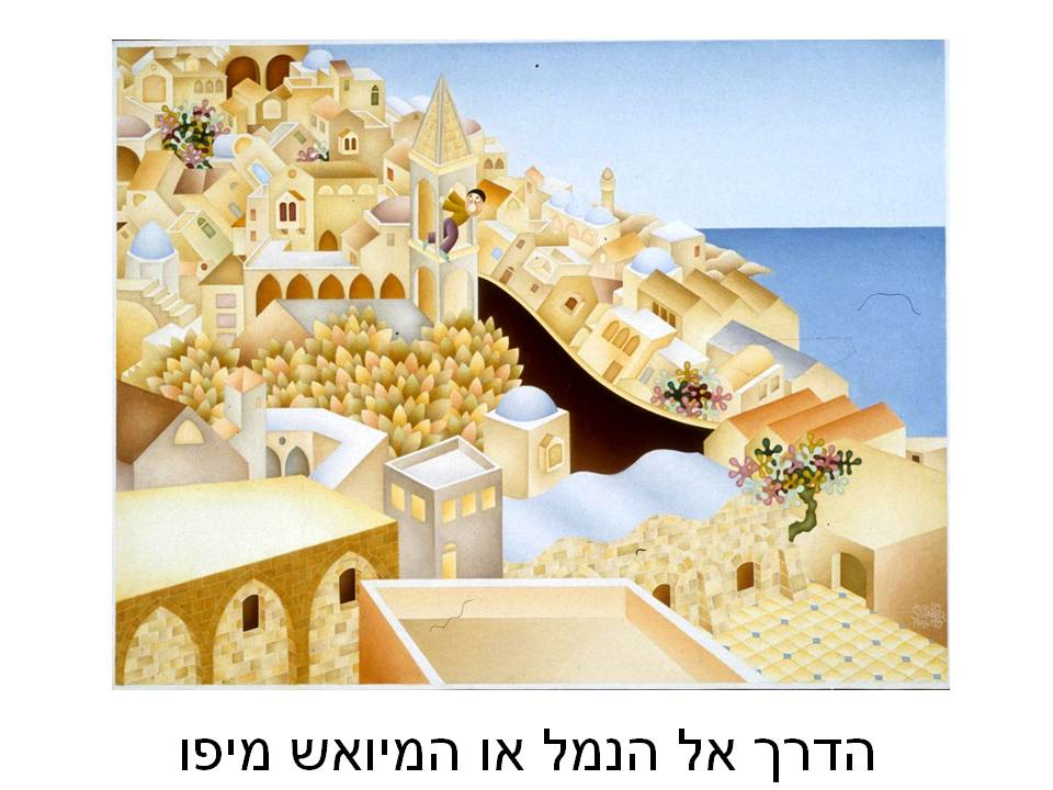 הדרך אל הנמל